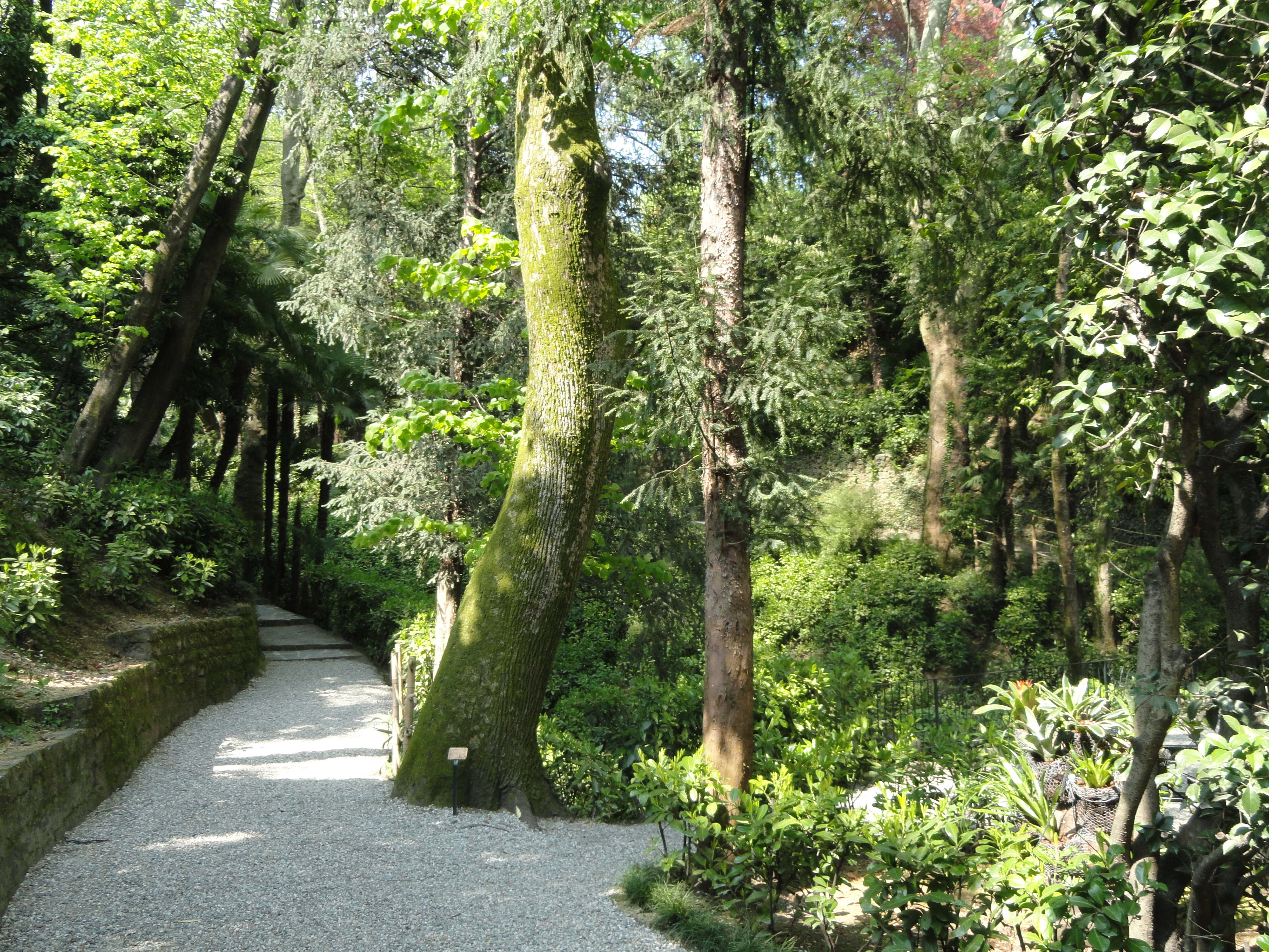 Villa Carlotta (Tremezzo), on Lake Como, Italy.